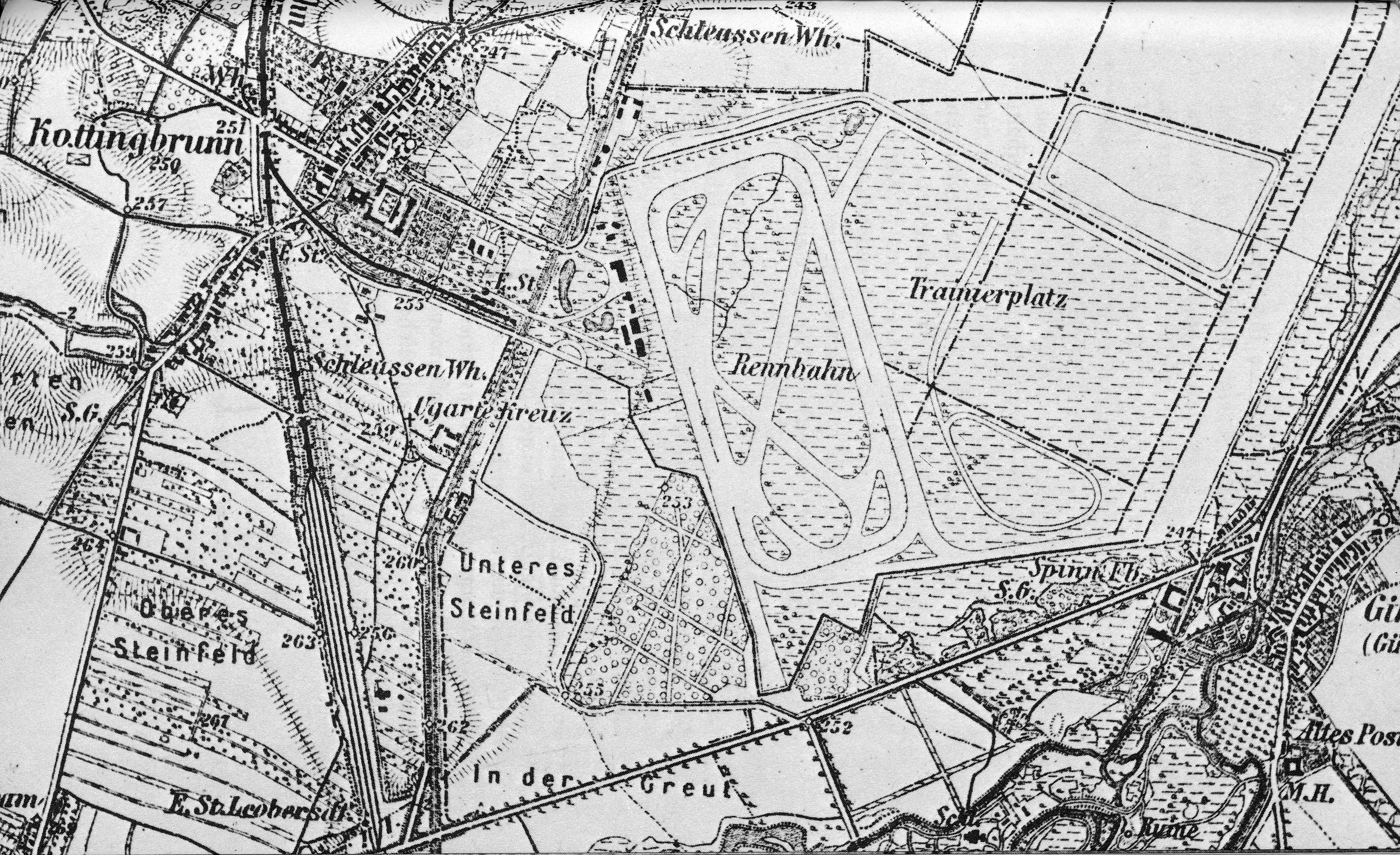 Niederösterreich, Plan (1:25.000) von Kottingbrunn samt Galopprennbahn (1896–1915)